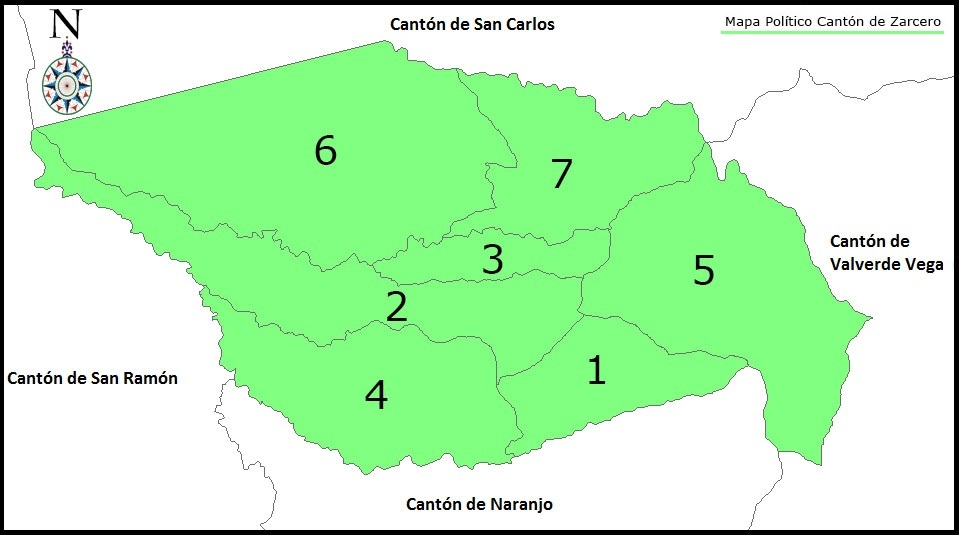 Mapa político del cantón de Zarcero, provincia de Alajuela, Costa Rica.